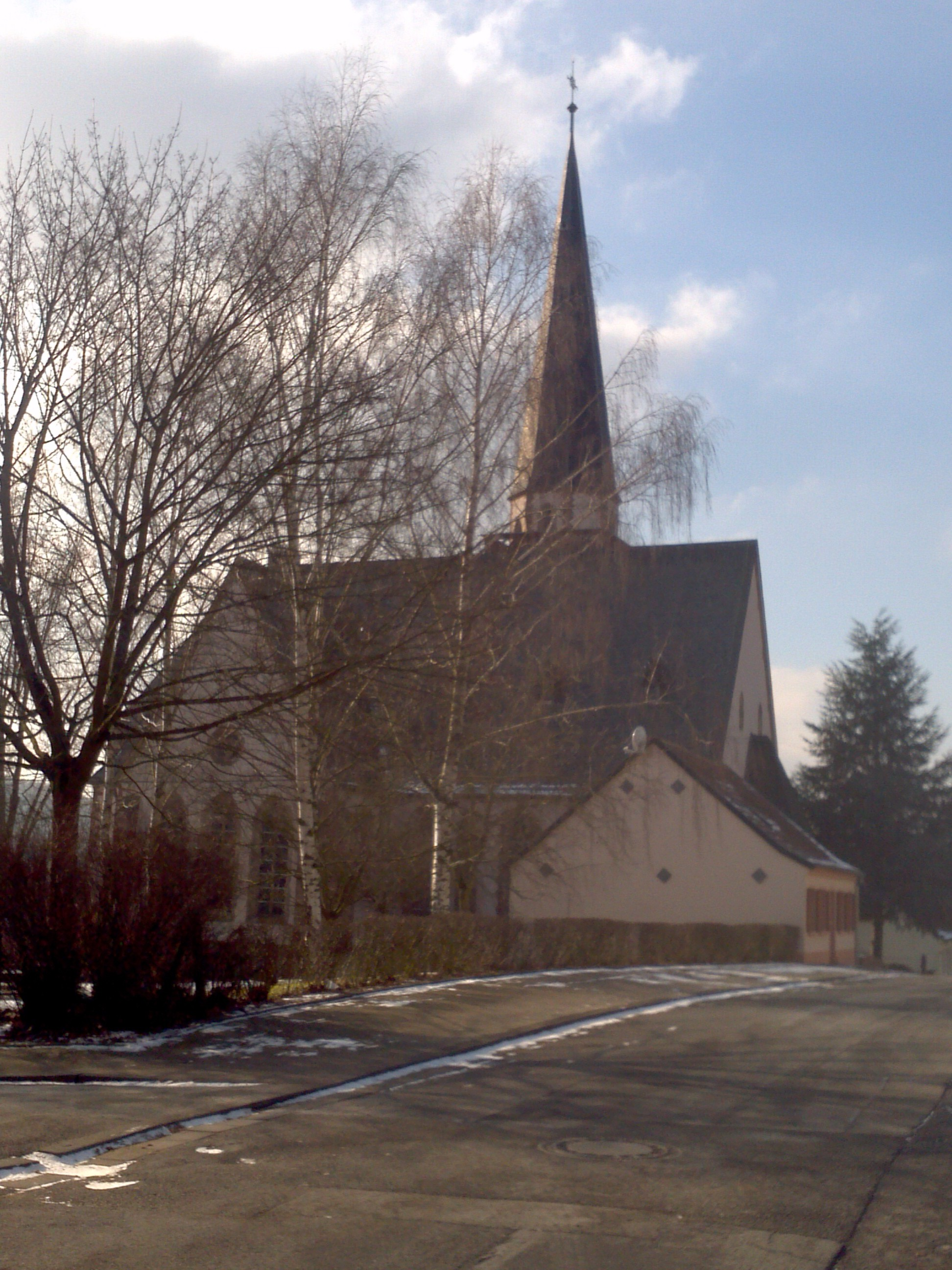 Kreuzkirche Kaltnaggisch (Saarbrücken-Herrensohr) mit Johannesstraße